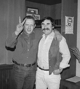 Stanisław Remuszko (po prawej) i Adam Michnik (z lewej)